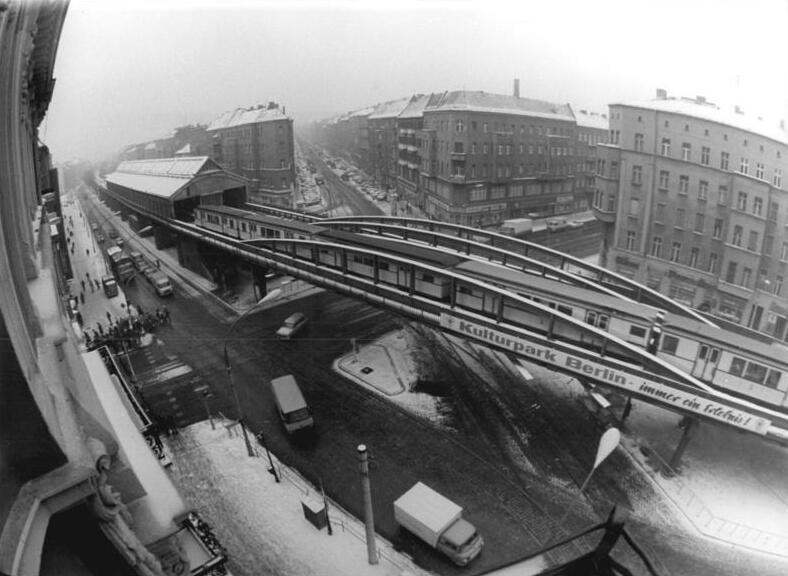 ADN-ZB-Kaufhold-11.1.80 Berlin: Die Kreuzung Schönhauser Allee- Ecke Dimitroffstraße aus ungewöhnlicher Sicht.